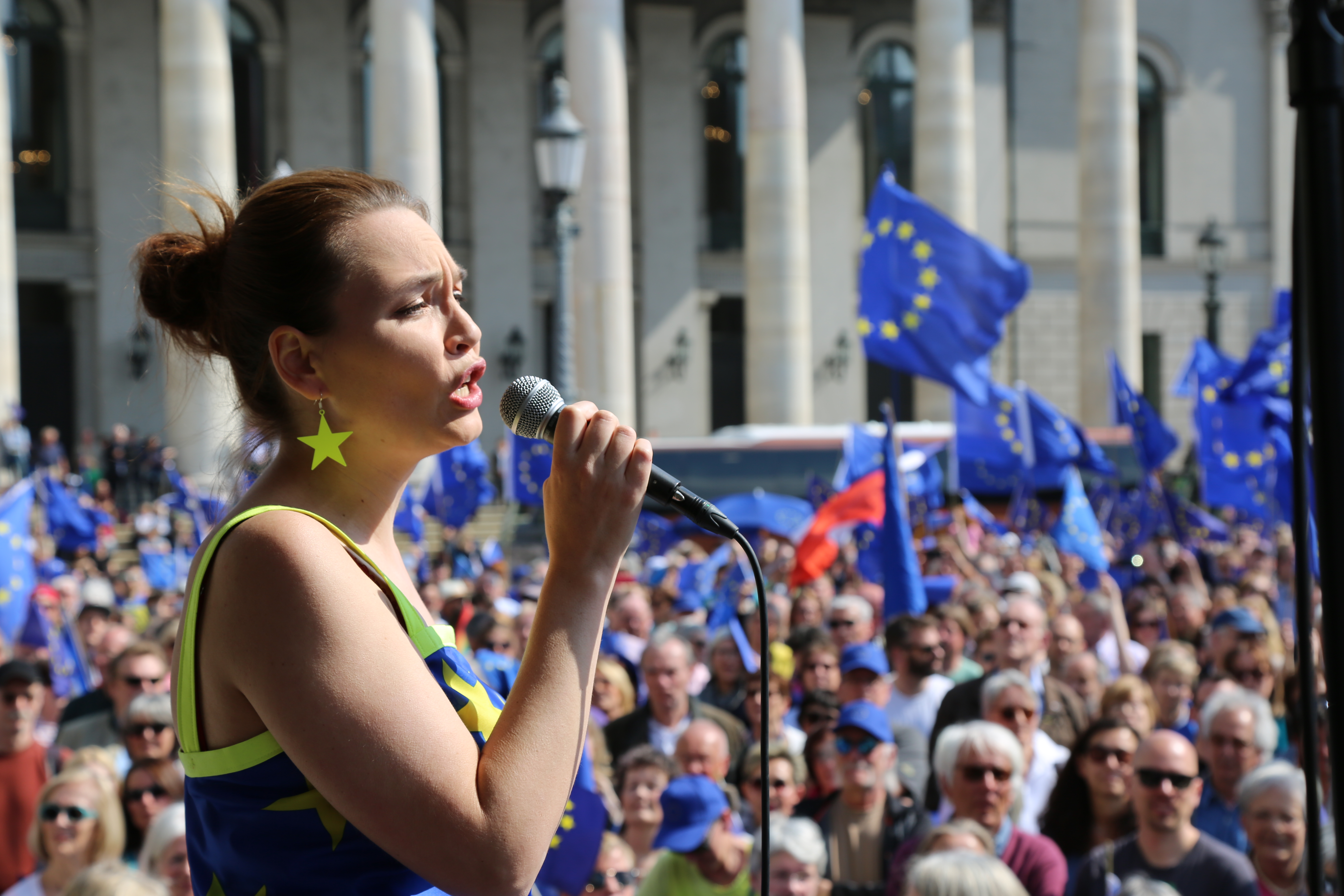 Pulse of Europe München, Max-Joseph-Platz. Sängerin Cornelia Lanz singt La vie en rose